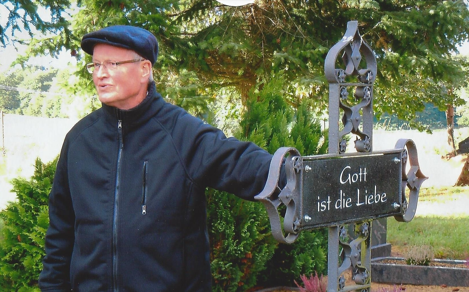 Sigurd Havemann (1943–2013), Pastor an der Stadtkirche in Krakow am See und an der Dorfkirche Dobbin, einer der vier Filialkirchen von Krakow, nach der Erneuerung der Grabanlage Havemann.